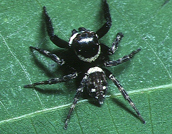 male Hasarius adansoni from Okinawa.